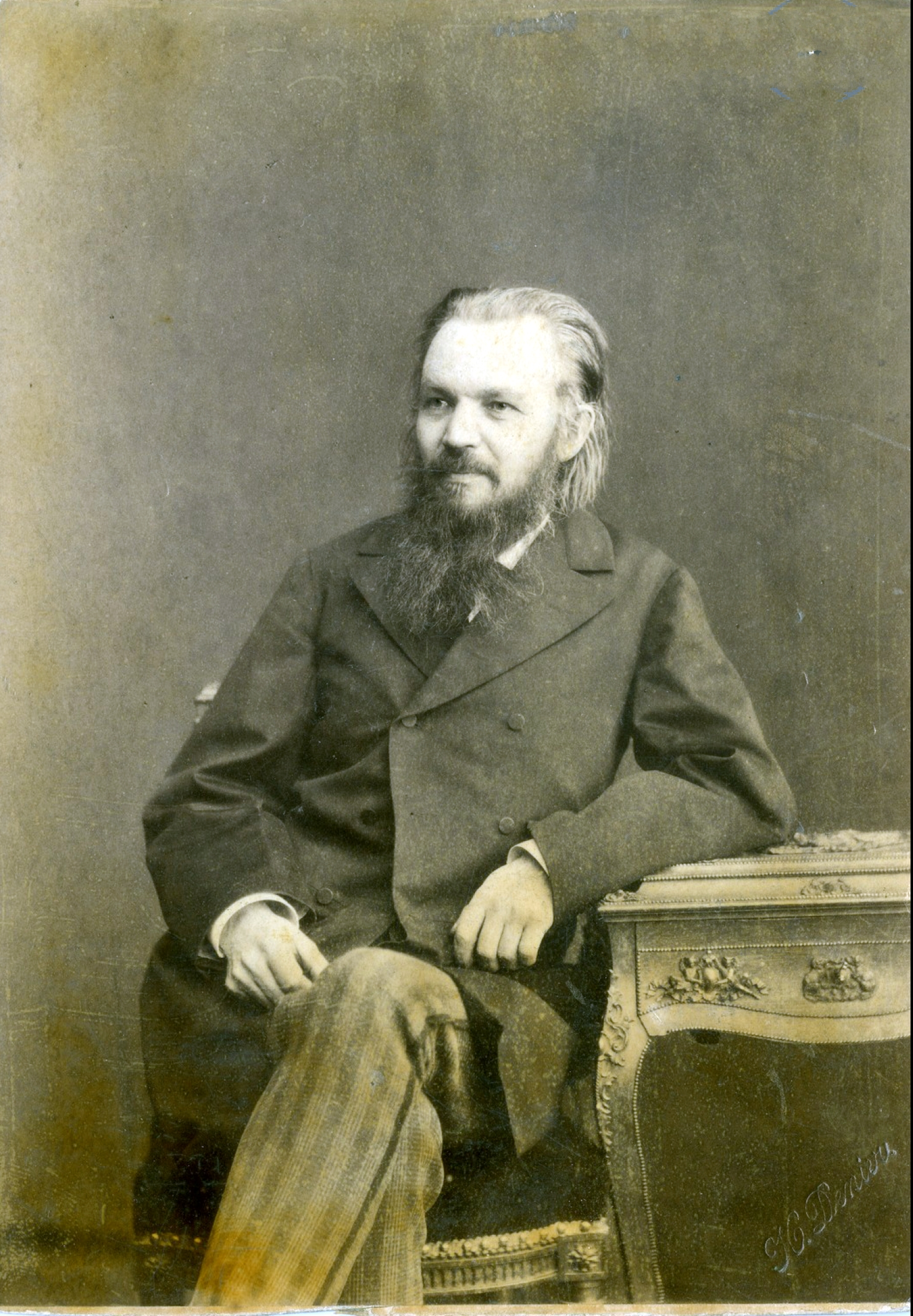 Суворин, Алексей Сергеевич